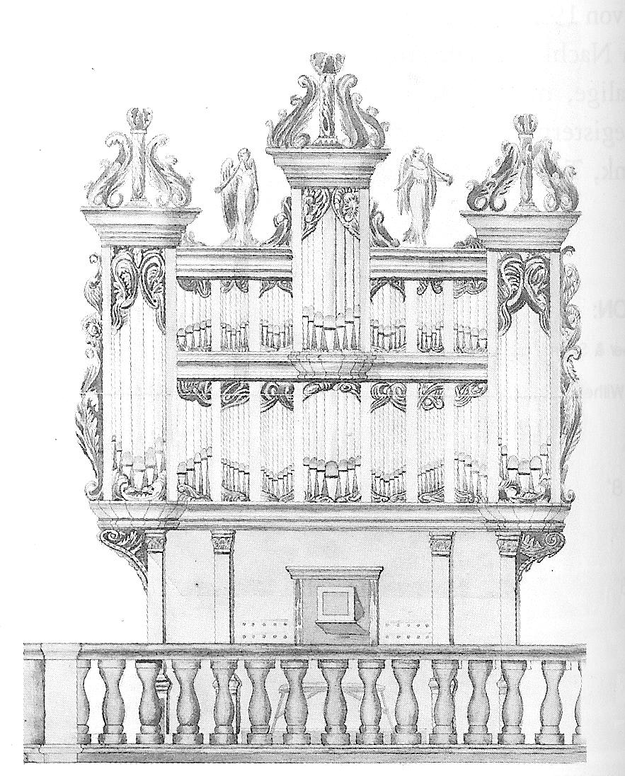 Orgelprospekt der Orgel der Burgkirche von Hans Hantelmann (1713), vor ihrem Ausbau 1815